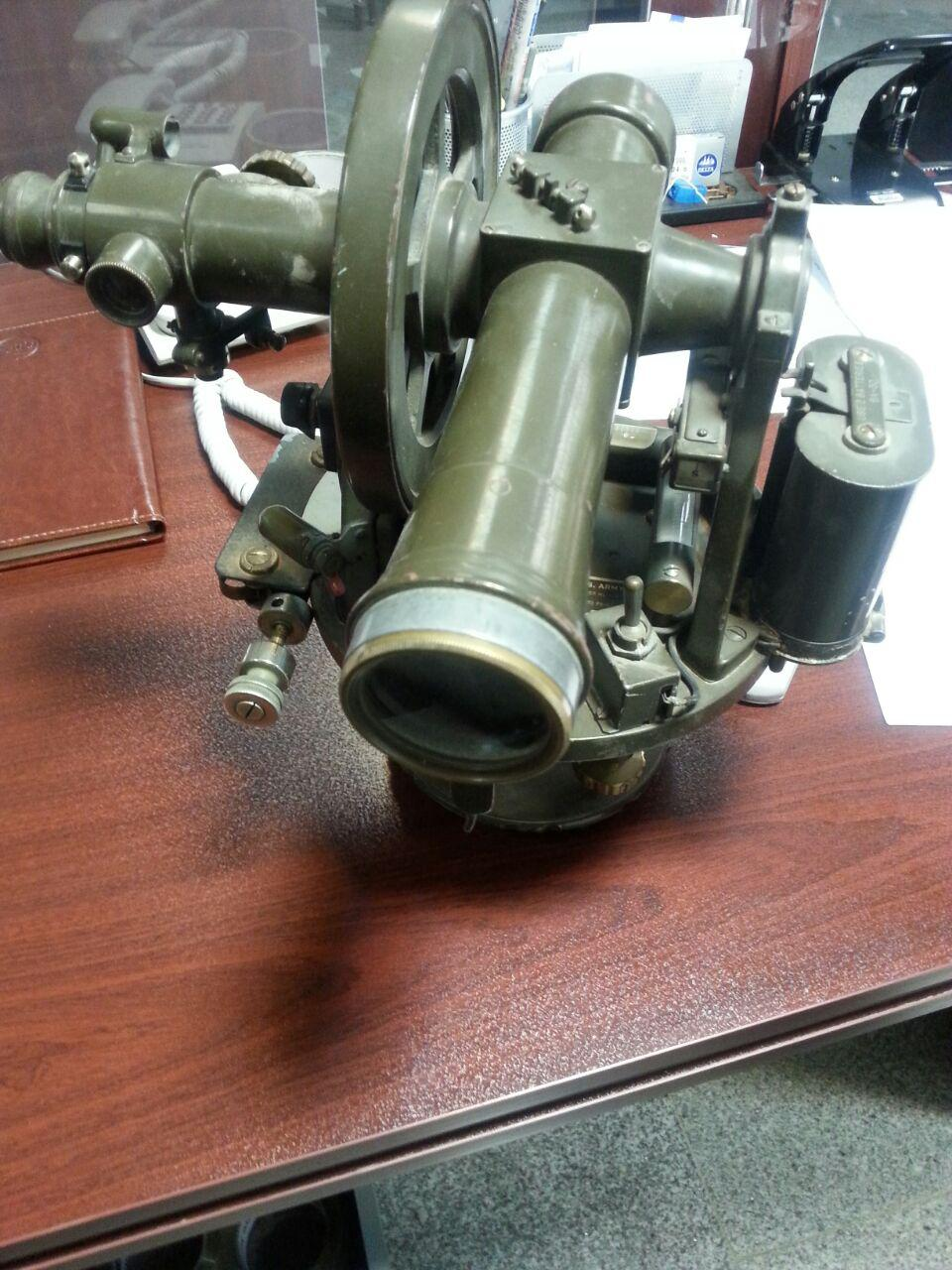 دوربین تئودولایت برای تعقیب بالون پایلوت به منظور به دست آوردن زاویه های افقی و قائم جهت به دست آوردن سمت و سرعت وزش باد در لایه های بالای جوّ